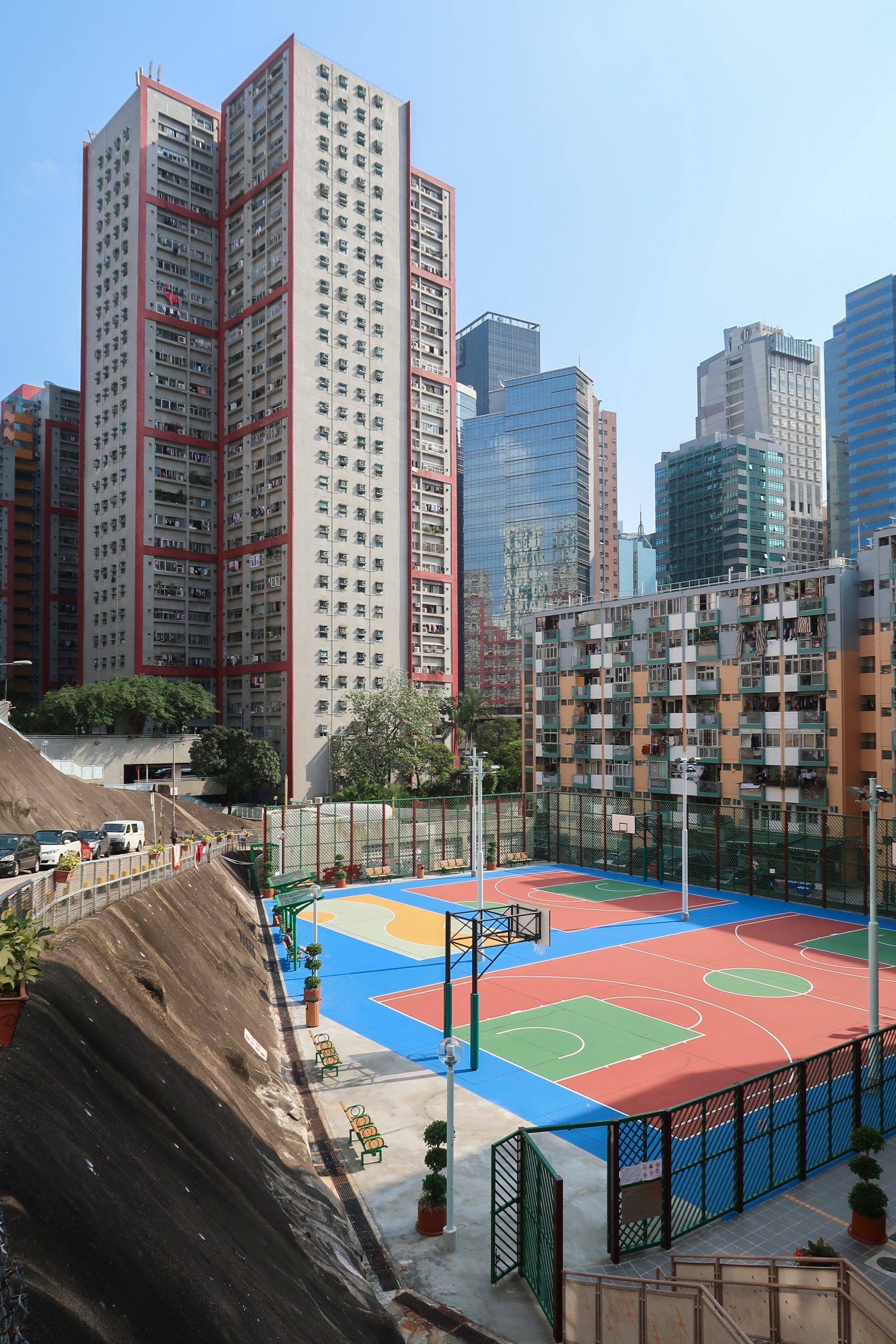 Kwun Tong Garden Estate Basketball Court